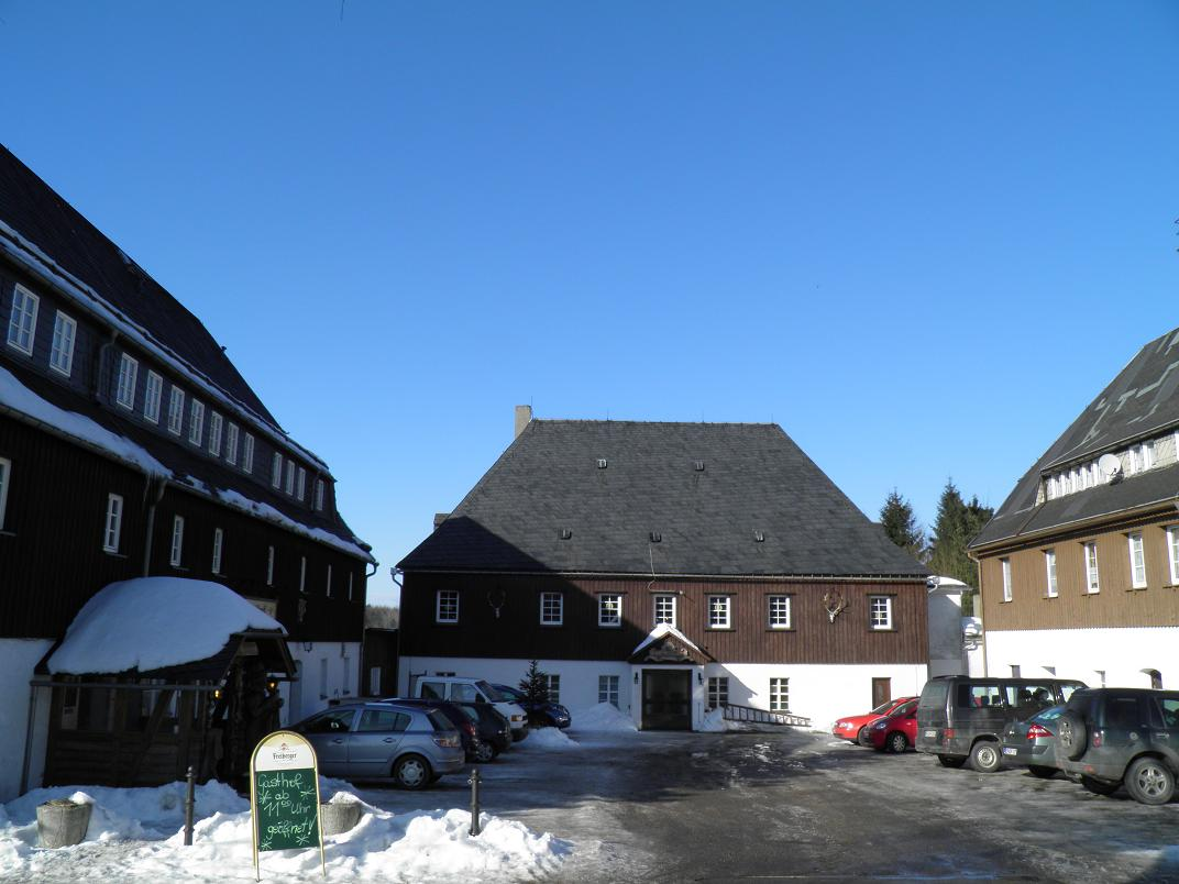 Bad Einsiedel, Dreiseithof im Winter 2014/15